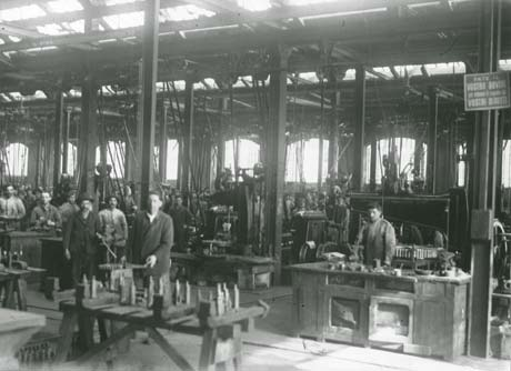 Posti di aggiustaggio e torneria alle officine Breda di Milano, reparto locomotive, negli anni '20